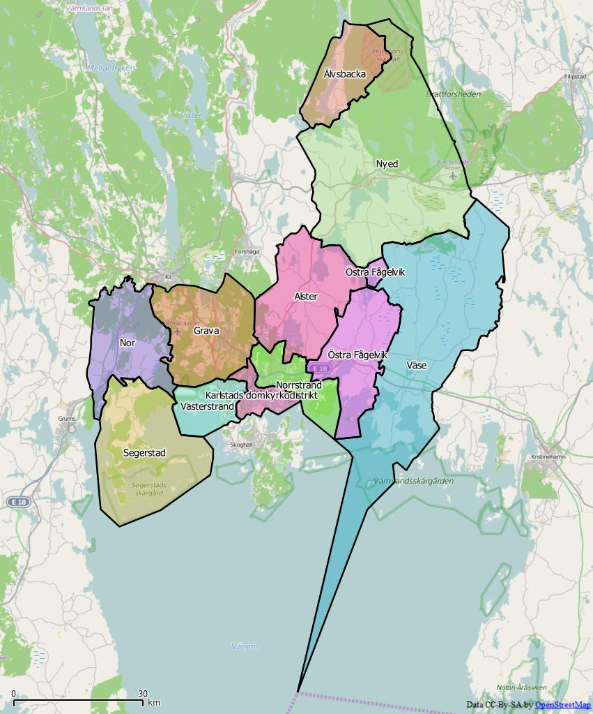 Distriktsindelningen i Karlstads kommun World file: 162.08993649247665303 0 0 -162.08993649247665303 1443550.72348830290138721 8353866.36990879848599434